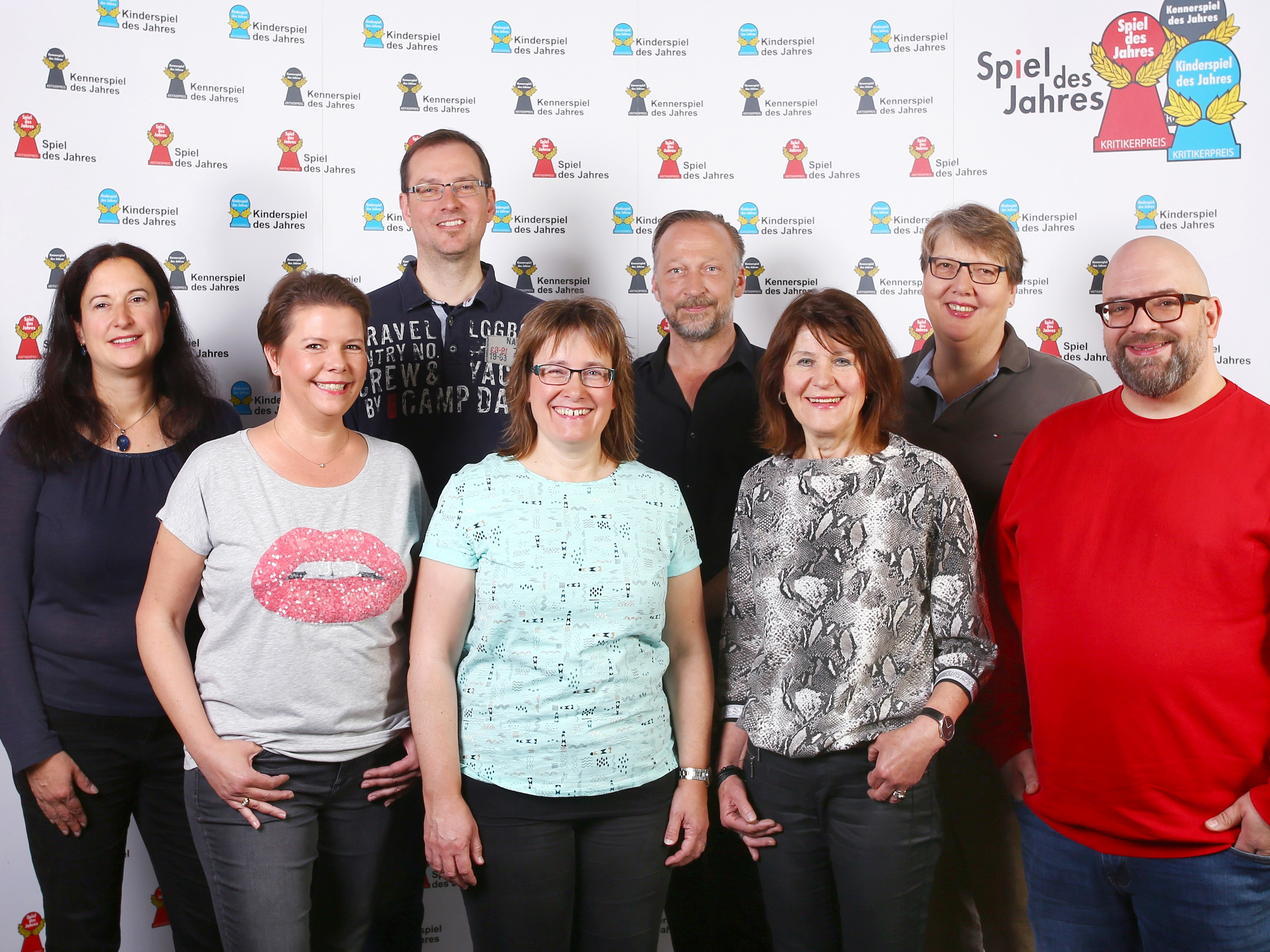 Stefanie Marckwardt, Sabine Koppelberg, Hauke Petersen, Gaby Kaufmann, Stefan Gohlisch, Tina Kraft, Cordula Dernbach, Christoph Schlewinski.